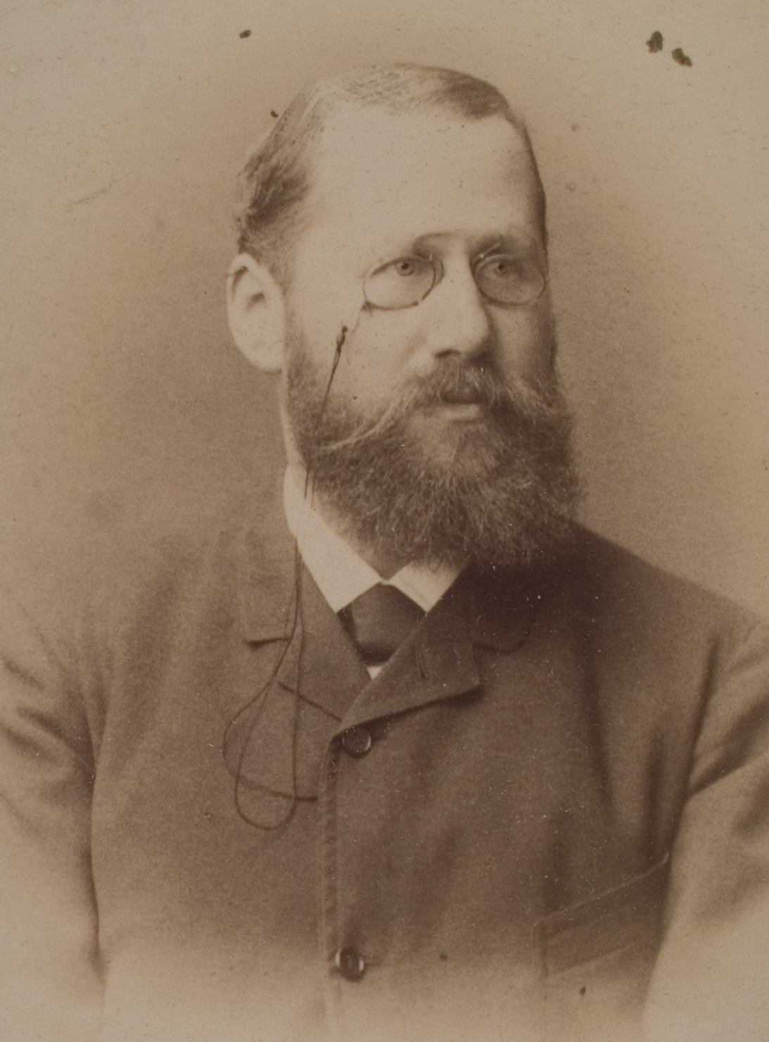 Georg Ludwig Cohn, Rechtshistoriker (Preußisches Recht), 1878–1892 Professor in Heidelberg